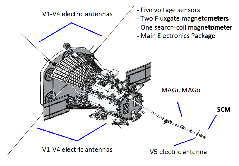 Parker Solar Probe Diagram instrument FIELDS